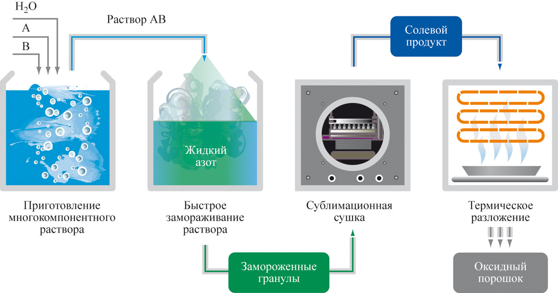 Basic processes cryochemical synthesis using frozen aqueous solutions // Основные процессы криохимического синтеза с использованием замороженных водных растворов